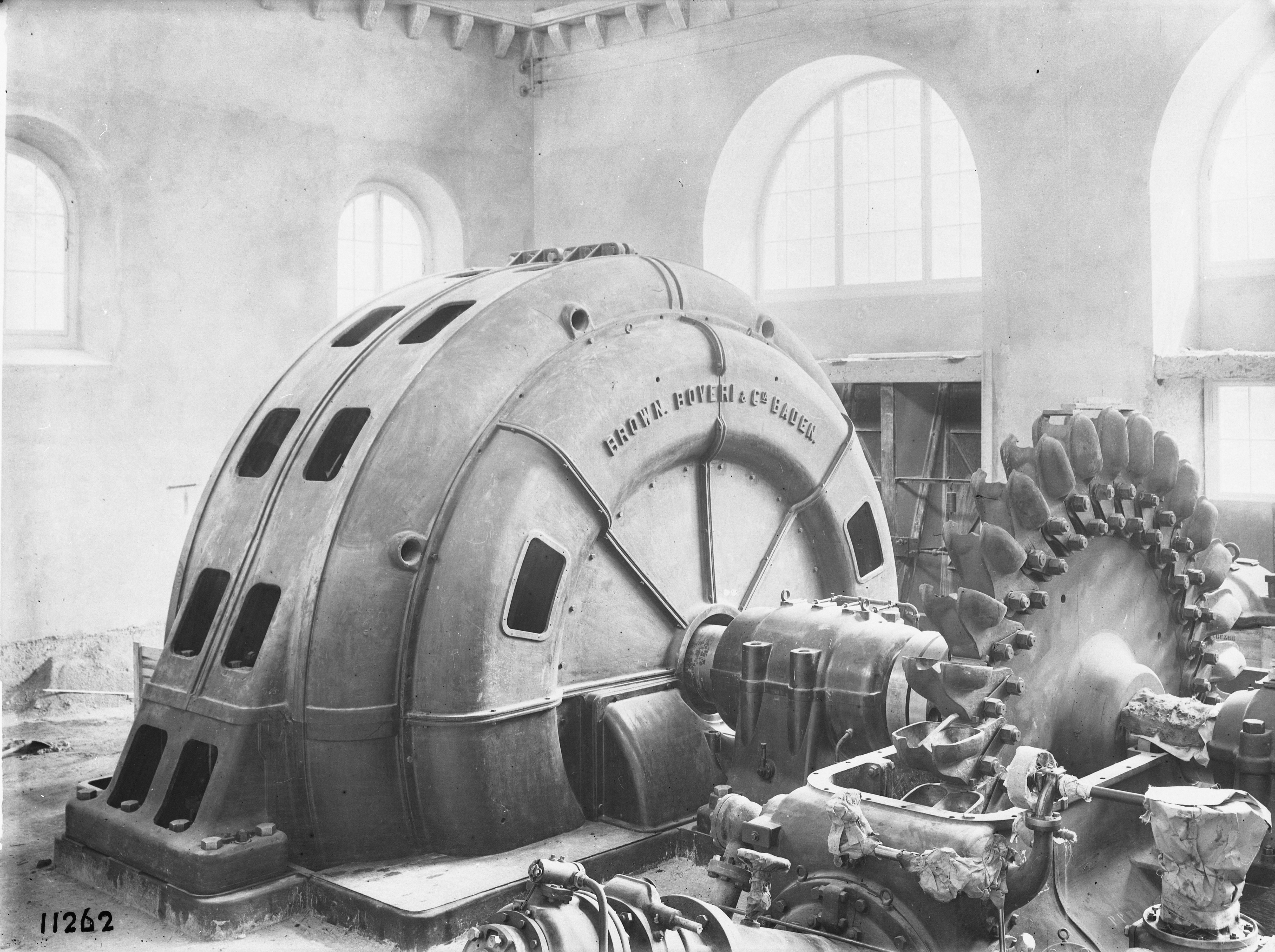 Kraftwerk Ritom. 9000 kVA Einphasen-Wechselstrom-Generator während der Montage: Generator 1 ist fertig aufgestellt, im Vordergrund die Turbine mit abgehobenem Gehäuse-Oberteil.